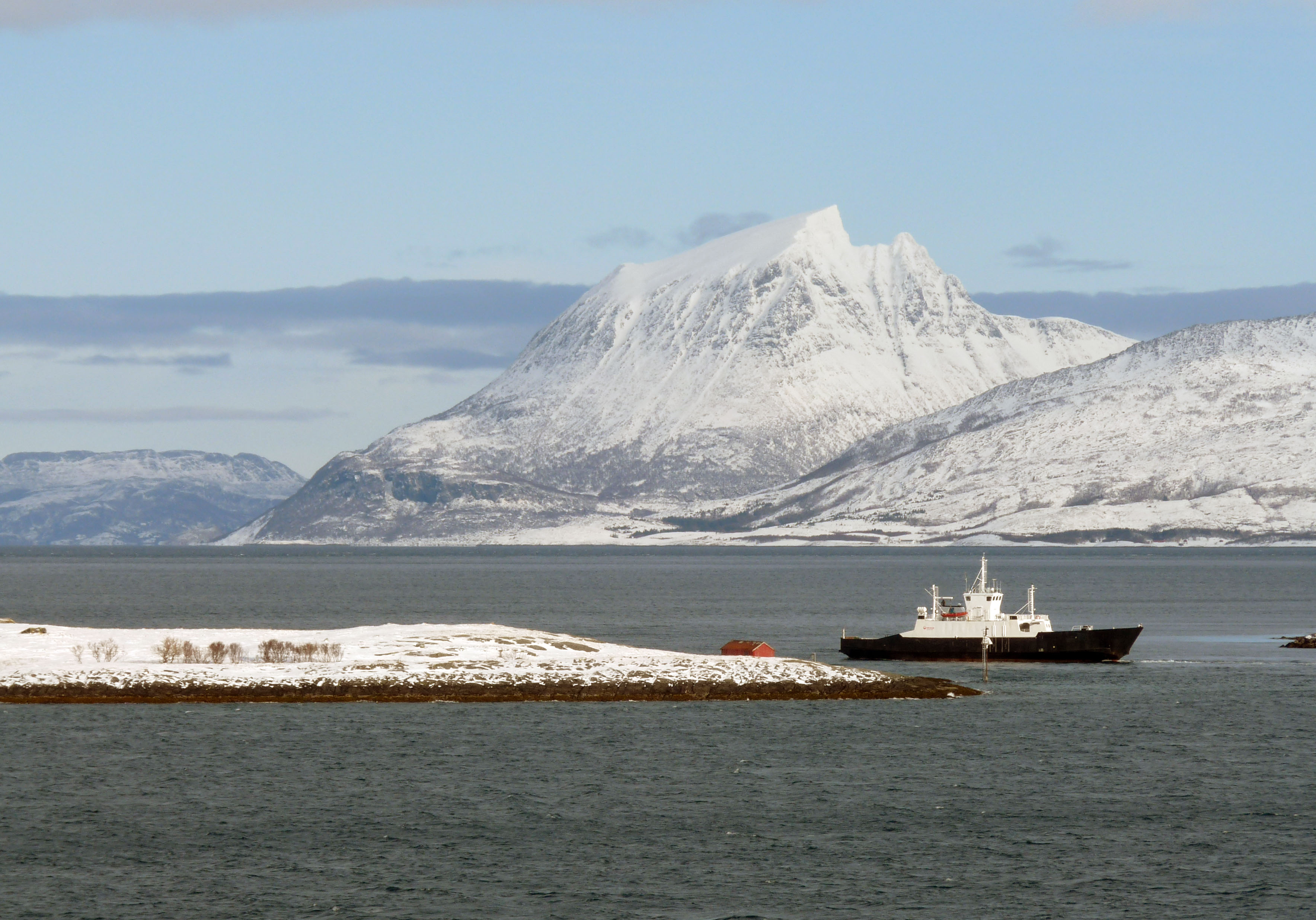 06 To Nesna